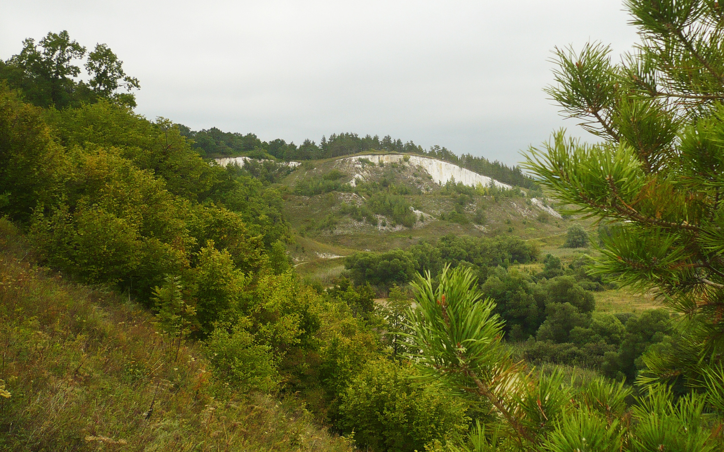 Дмитриевское городище. Вид с детинца на посад. 2012.